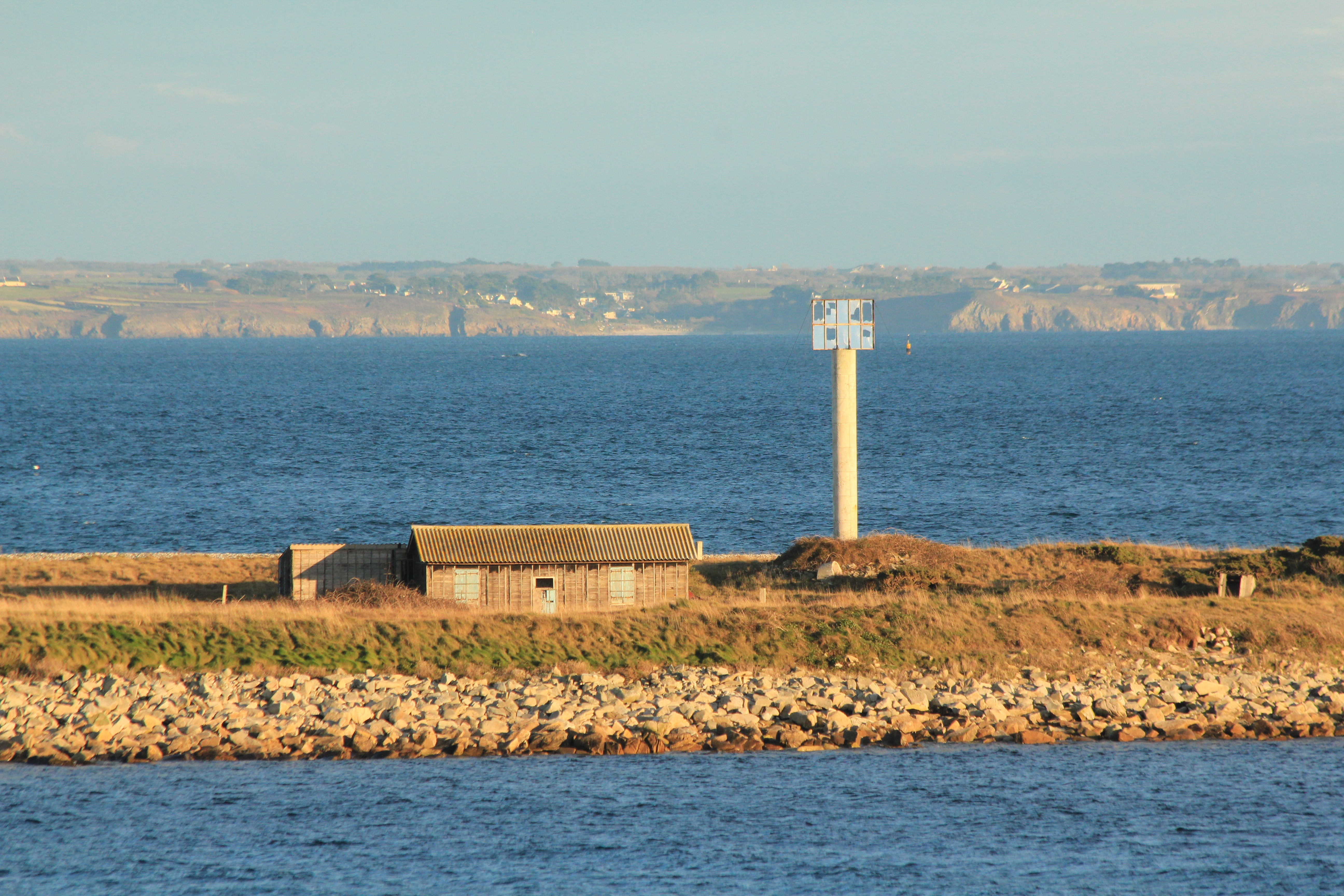 Photo du Lédènes de Molène vu depuis Molène